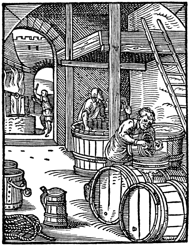 Der Bierbreuwer (Bierbrauer) Holzschnitt aus: Jost Amman (1539-1591): Eygentliche Beschreibung aller Stände auff Erden hoher und nidriger, geistlicher und weltlicher, aller Künsten, Handwerken und Händeln ... (erstmals Frankfurt am Main 1568; auch bekannt als: Das Ständebuch) Im Buch wird das Bild von folgendem Text von Hans Sachs begleitet: Auß Gersten sied ich gutes Bier, Feißt und Süß, auch bitter monier, In ein Breuwkessel weit und groß, Darein ich denn den Hopffen stoß, Laß den in Brennten külen baß, Damit füll ich darnach die Faß Wol gebunden und wol gebicht, Denn giert er und ist zugericht. (Anmerkungen: feißt hier wohl = "dickflüssig"; monier = Art, Manier; Brennte = Bottich; gepicht = mit Pech abgedichtet; giert = gärt)